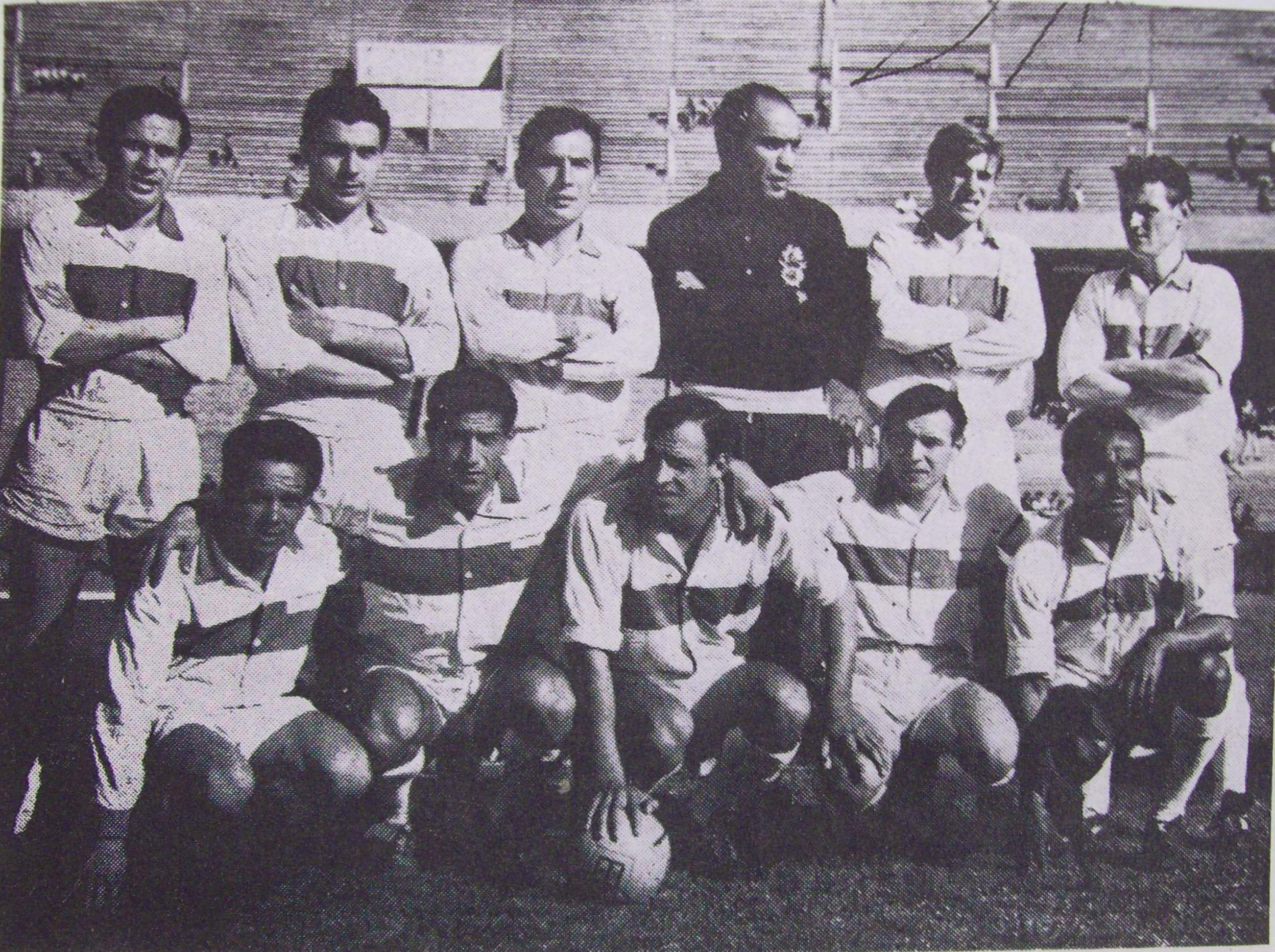 El equipo de Gimnasia y Esgrima La Plata que en 1962 punteó el campeonato oficial de fútbol hasta las últimas fechas, realizando hasta ese momento la mejor campaña en la historia del fútbo profesional platense.